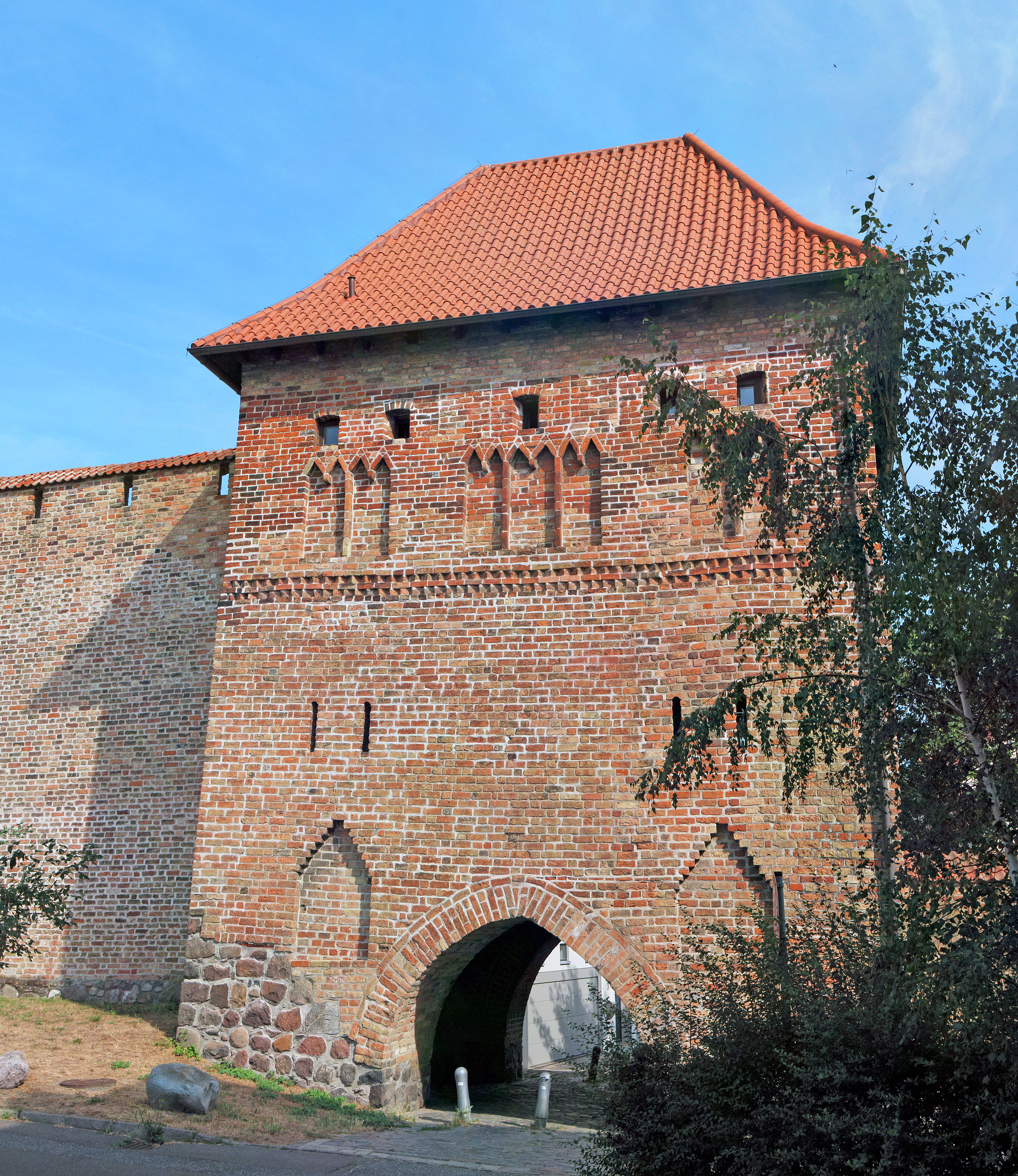 Dieses Bild zeigt das Kuhtor in Rostock. Das nachweislich älteste Stadttor Norddeutschlands.